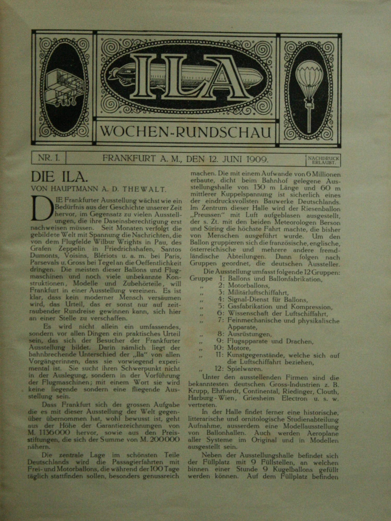 Titelseite der ILA-Wochenzeitung